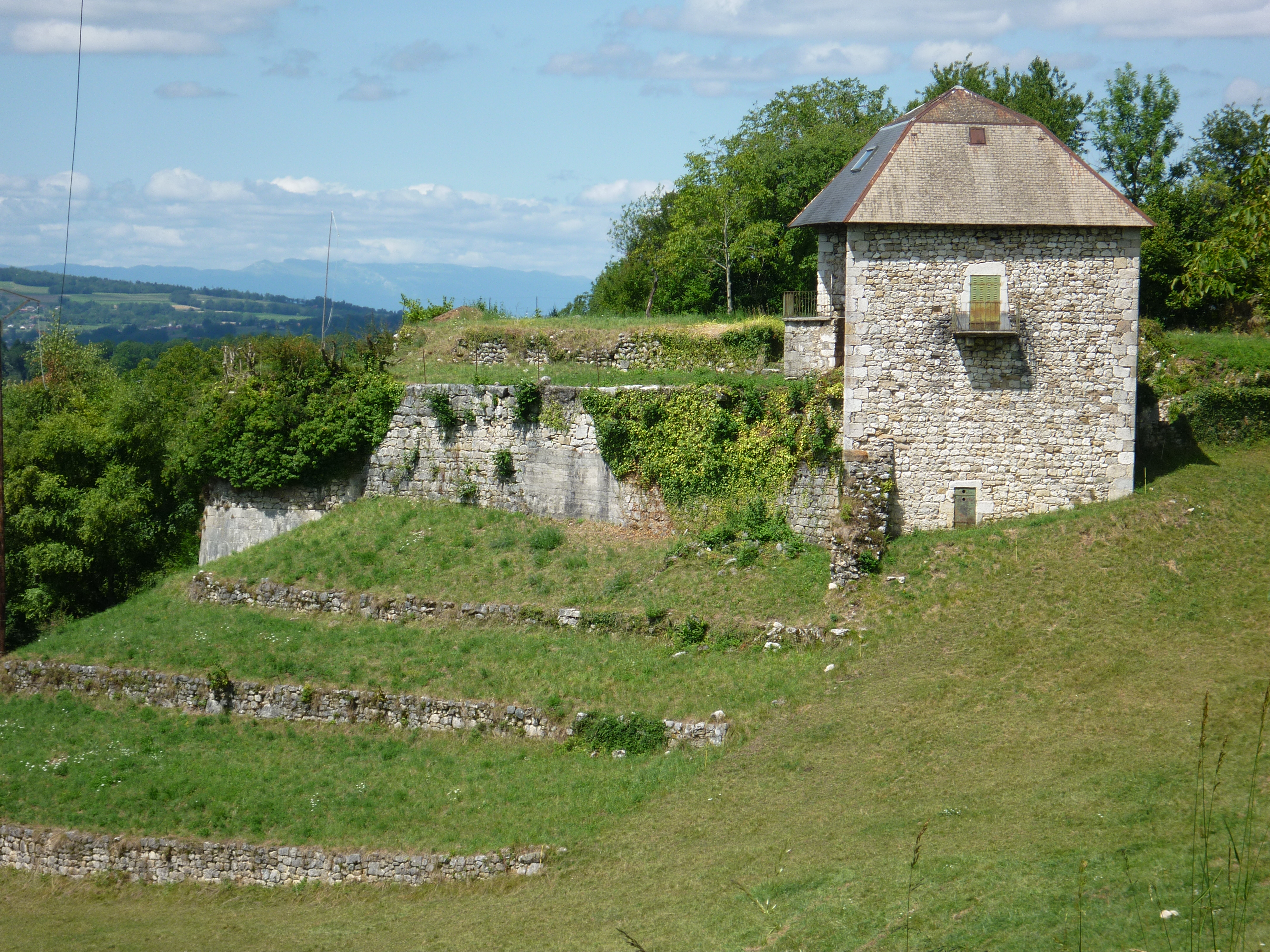 Château de Gruffy (Haute-Savoie, France). A appartenu au Moyen-Age aux comtes de Genève, au XVI° siècle aux Compey, puis aux Menthon-La Balme (barons de Gruffy) du XVI° au XIX° siècle.